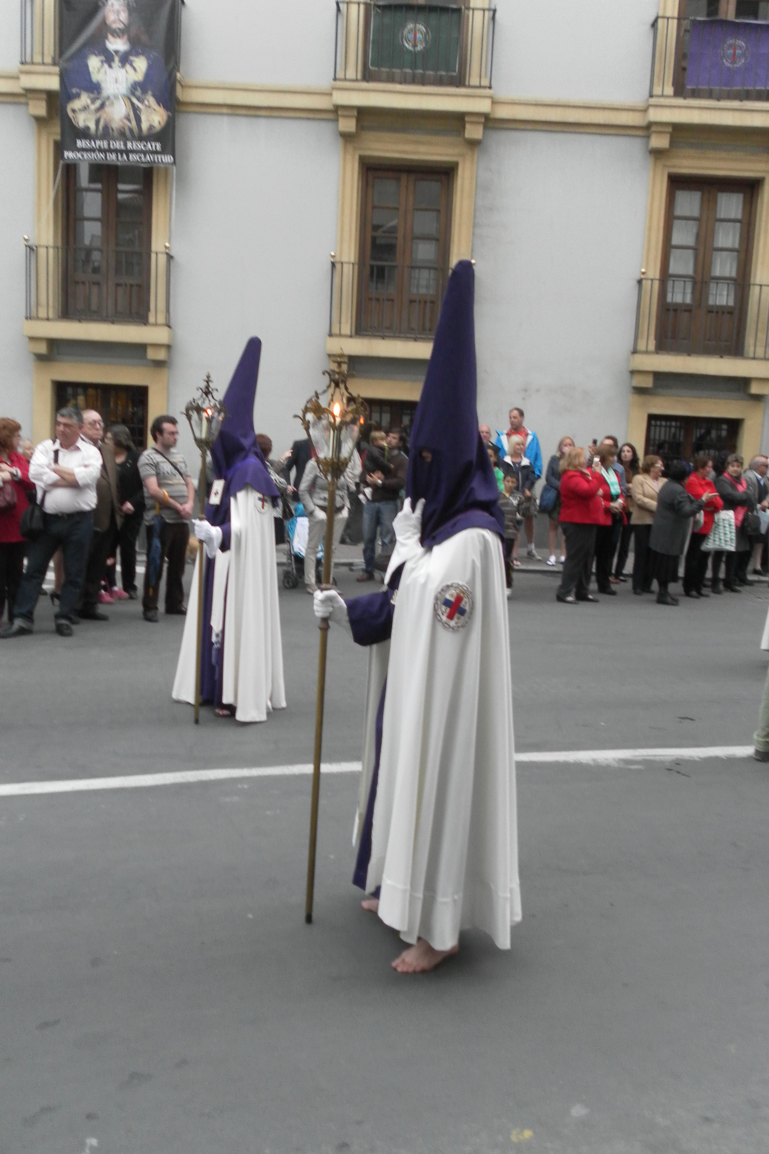 Vestimenta de los nazarenos de la Hermandad del Rescate (Murcia, España).